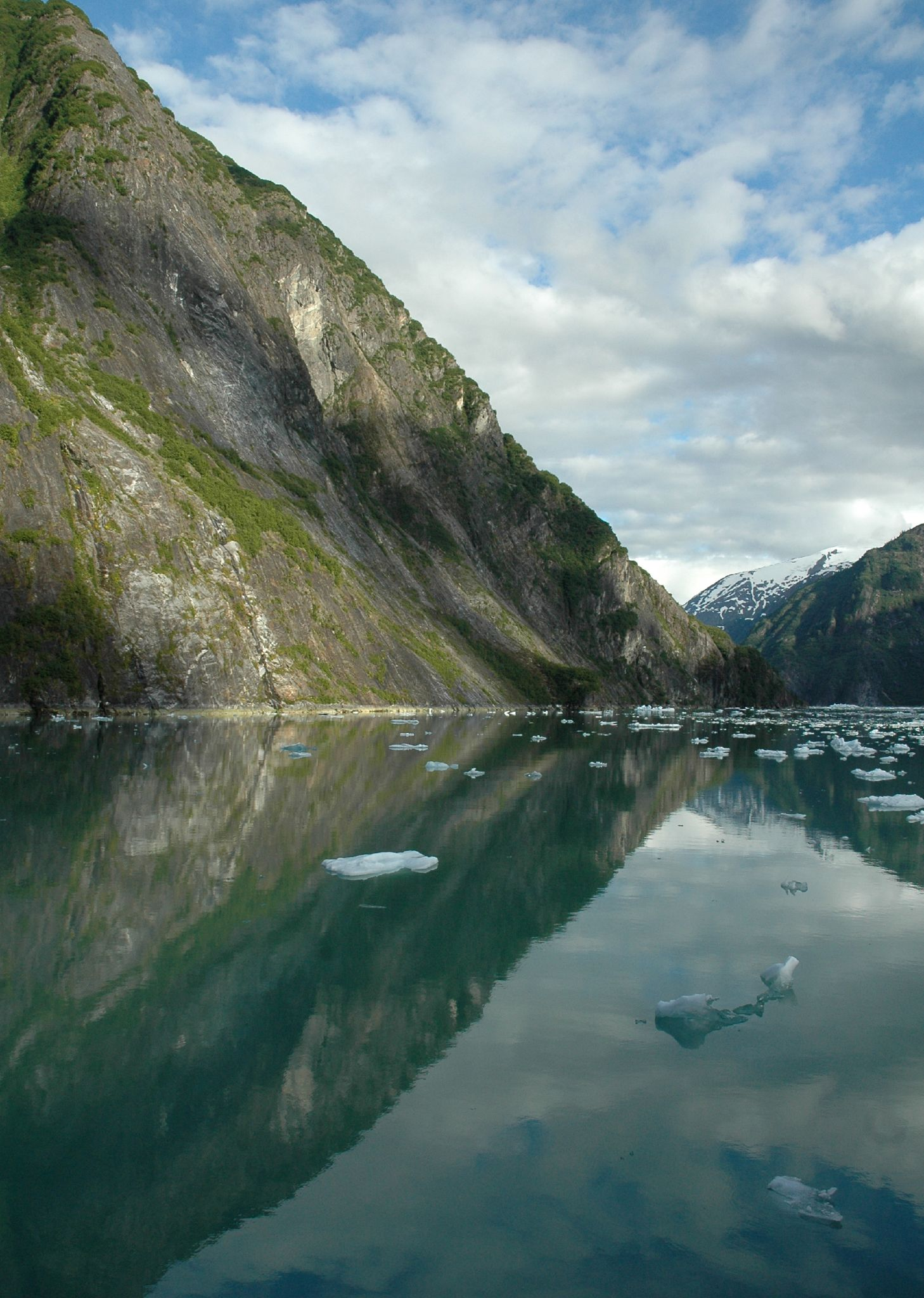 7900 Near Tracy Arm fjord - Alaska